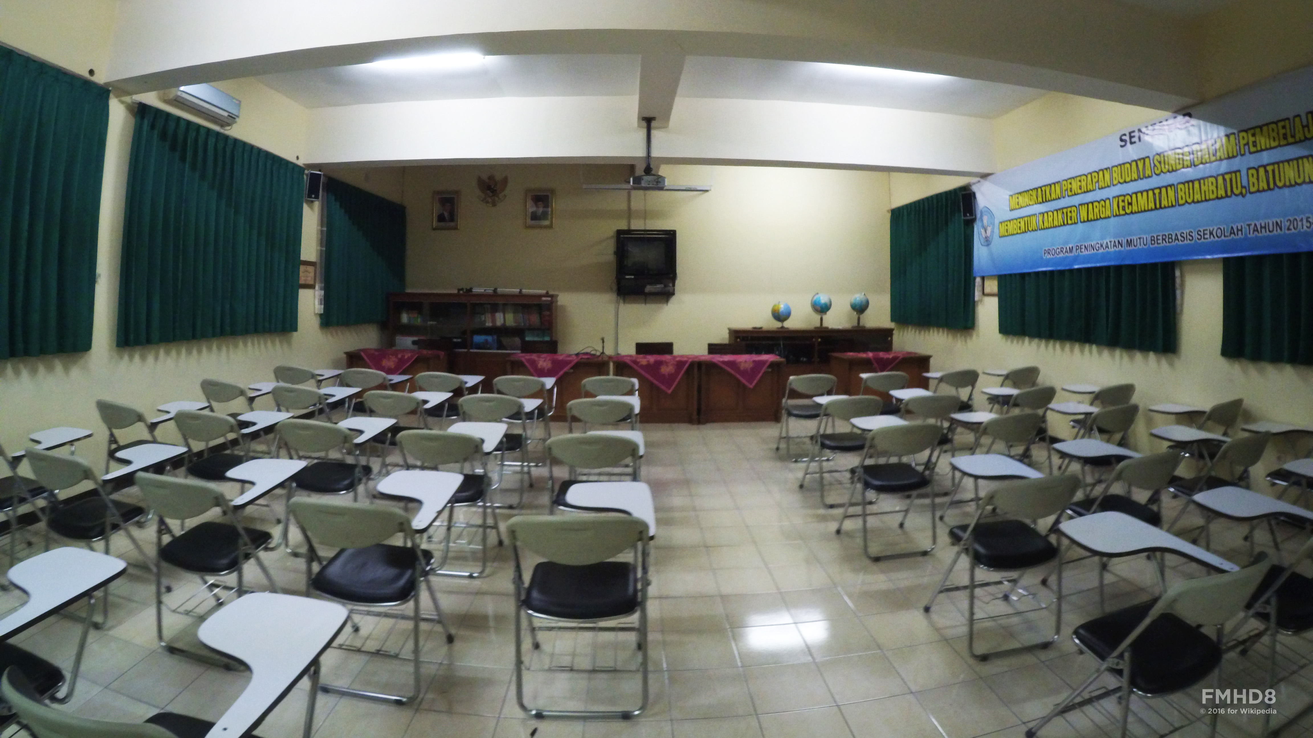 Ruang Multimedia